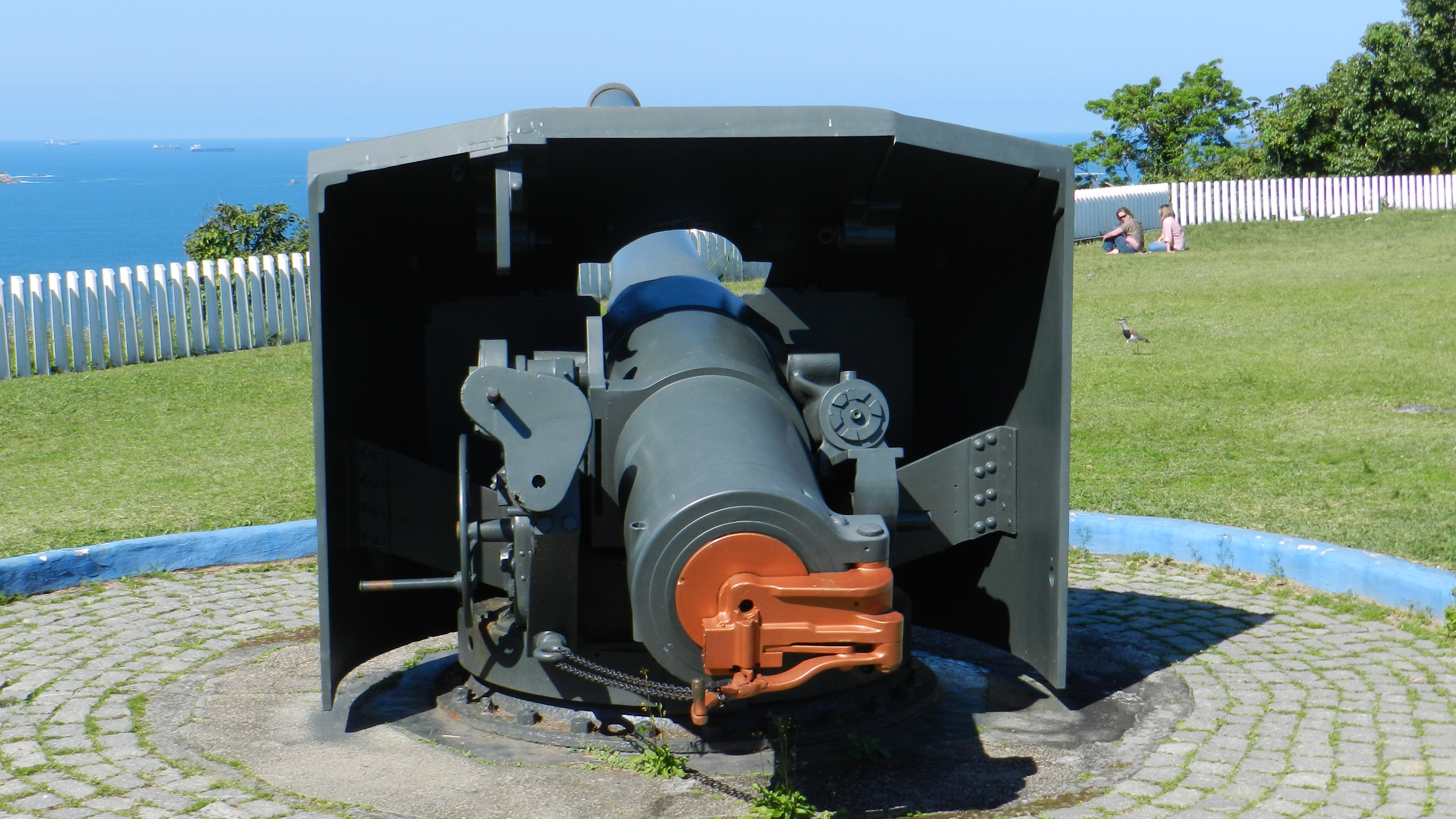 FORTE MARECHAL LUZ - São Francisco do Sul SC